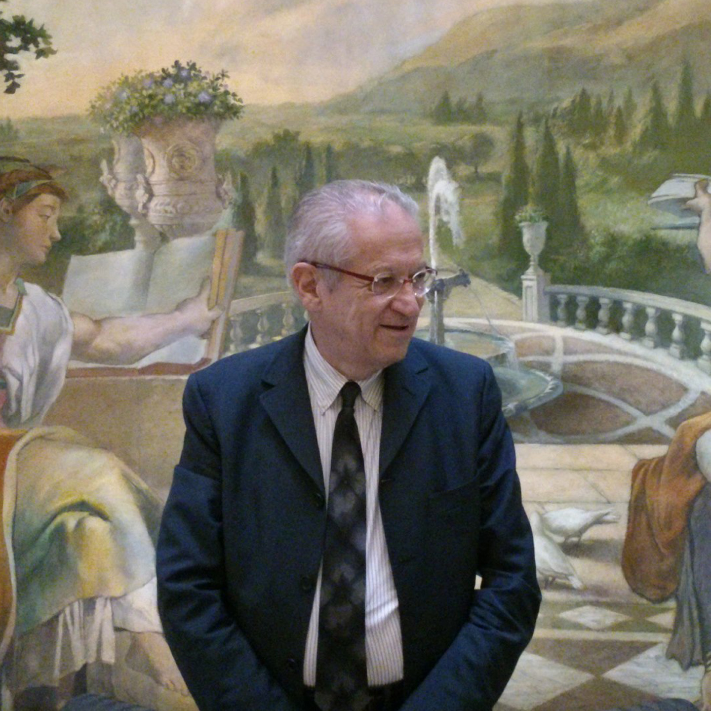 Sergio Fintoni